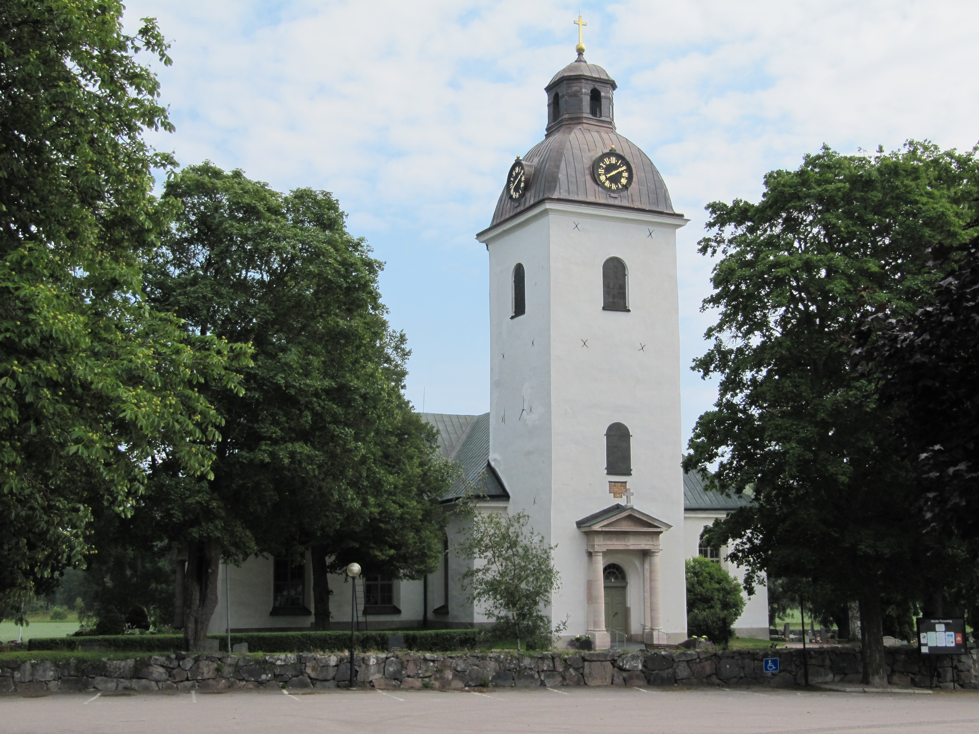 Alunda kyrka